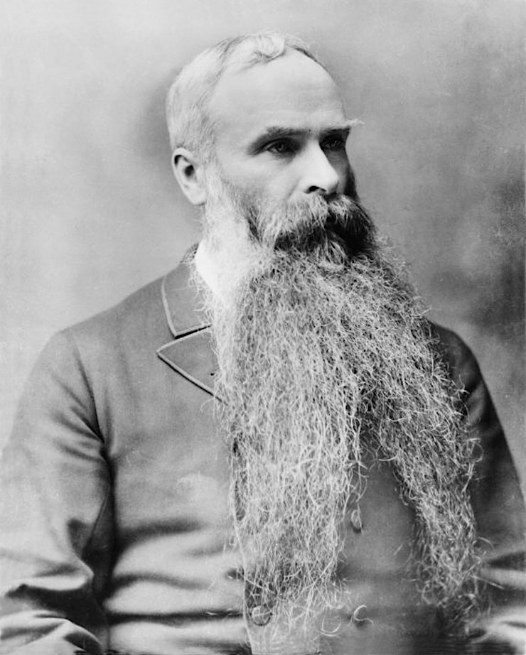 L’Honorable Louis-Olivier Taillon (1840-1923), premier ministre du Québec du 16 décembre 1892 au 11 mai 1896.